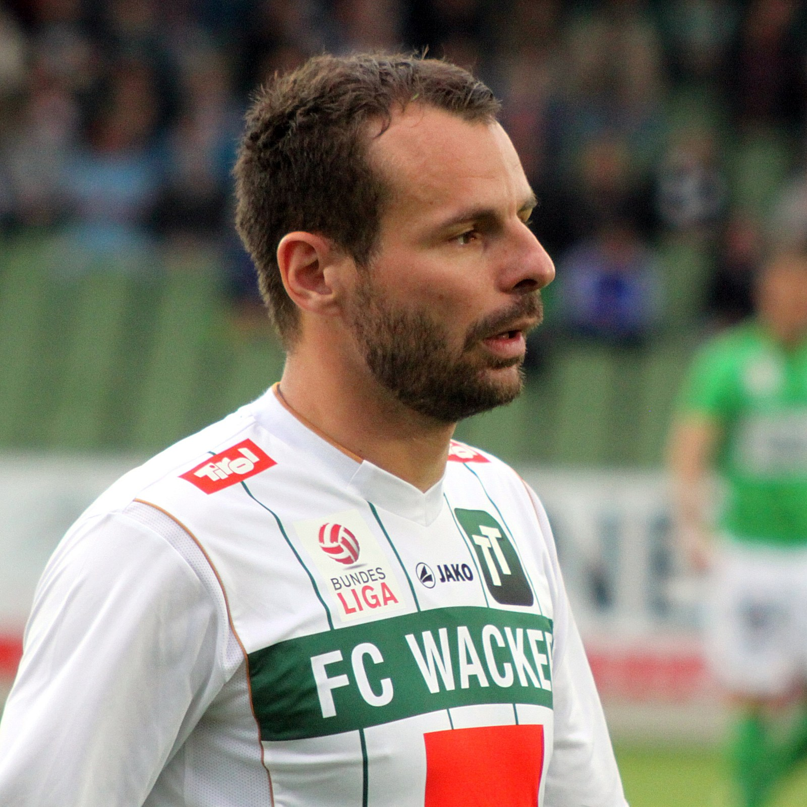 Meisterschaftsspiel der österreichischen Bundesliga: SV Mattersburg gegen FC Wacker Innsbruck am 7. April 2013 (0:0)] im Mattersburger Pappelstadion. - Das Foto zeigt Roman Wallner (FC Wacker Innsbruck). Object location47° 44′ 21.66″ N, 16° 24′ 23.13″ E